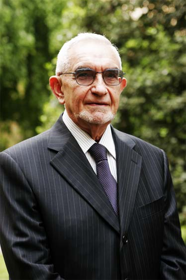 Giuseppe Guzzetti, presidente della Fondazione Cariplo